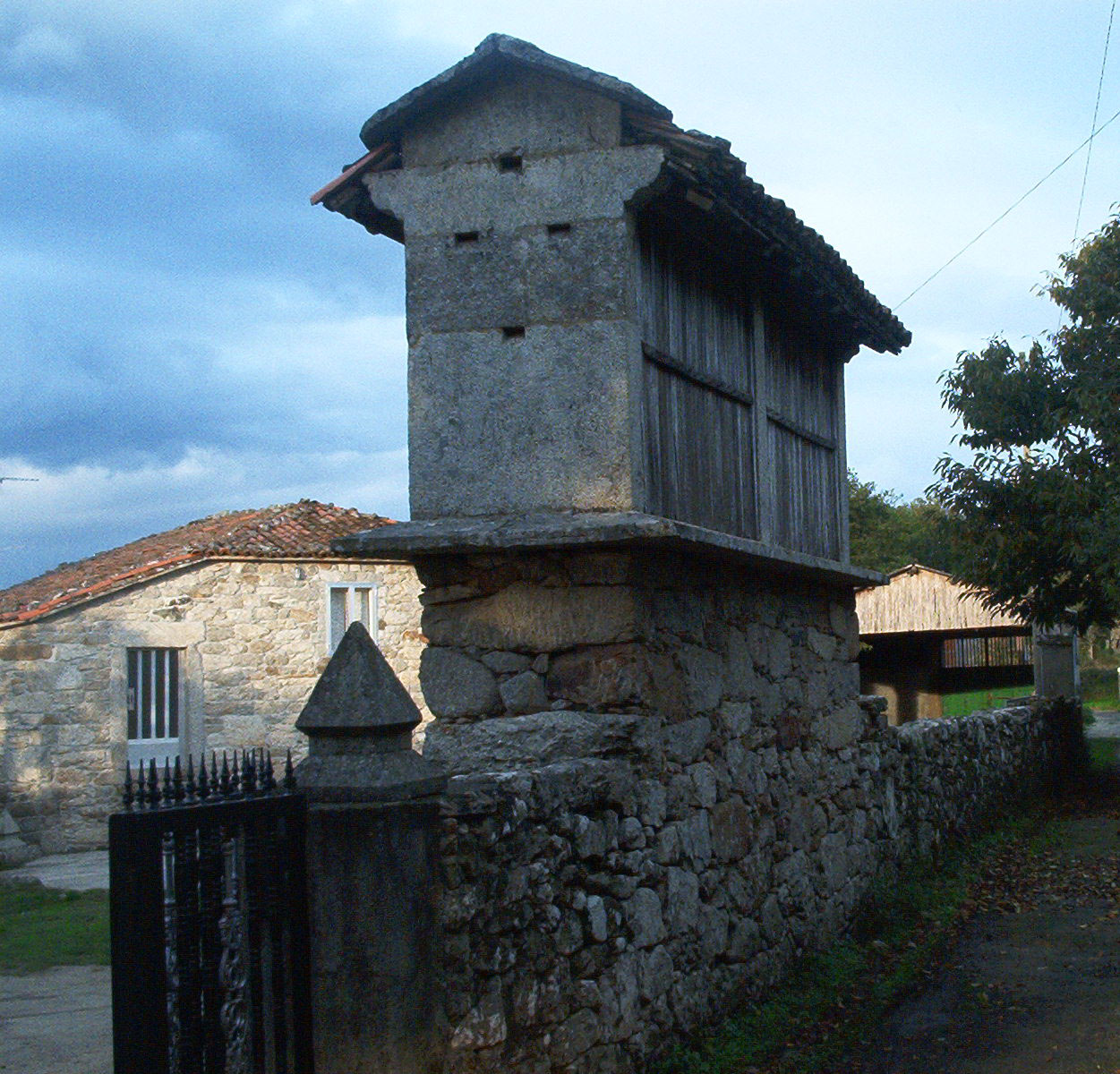 Hórreo de tipo mahía, sobre o muro que pecha o curral da casa, ao que se lle engade unha soleira para procurarlle máis aireación. Na actualidade non presenta adornos. Ubicado na Aldea de Baixo de Vilapoupre en Antas de Ulla.